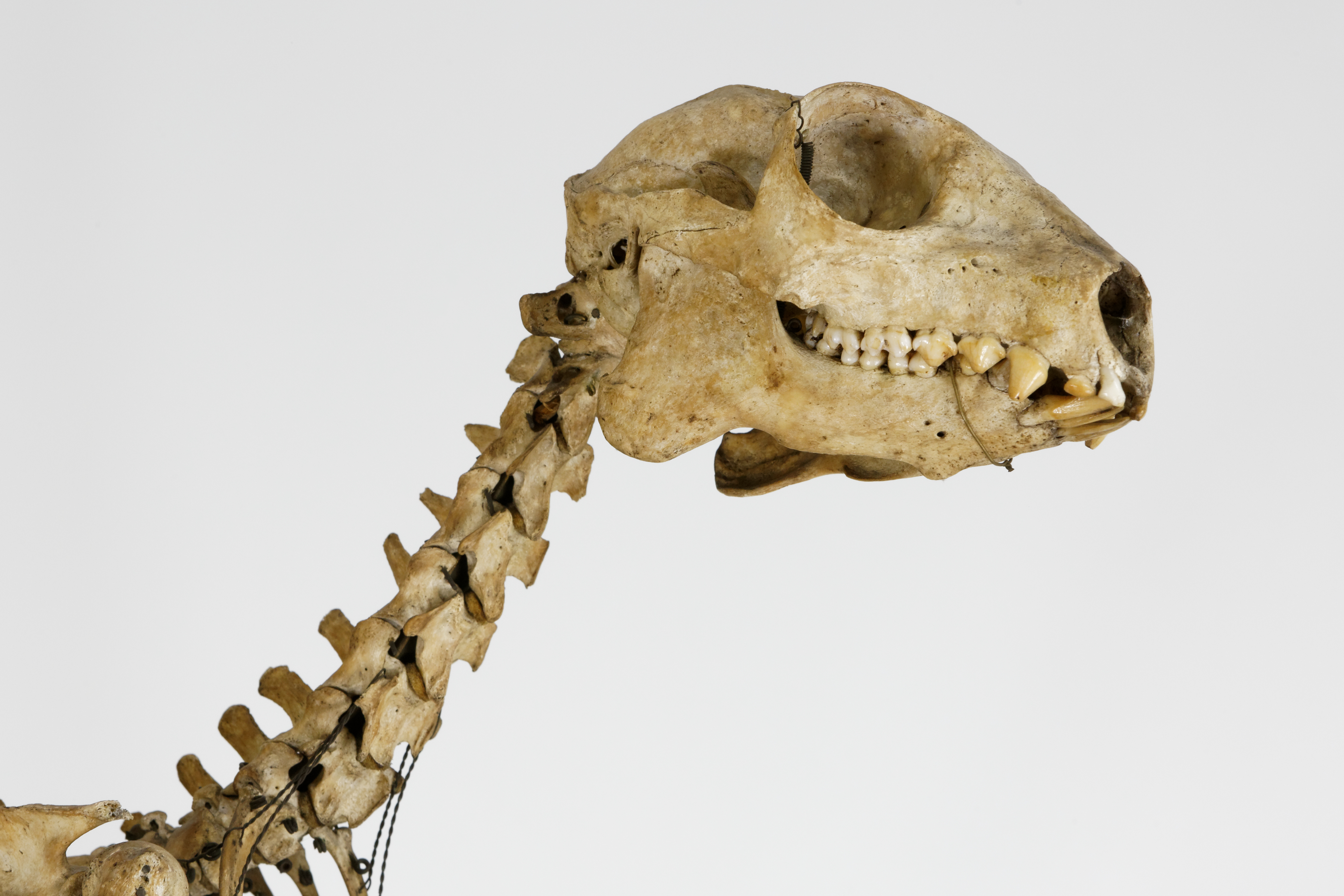 collection de l'Université Pierre-et-Marie-Curie à Paris.